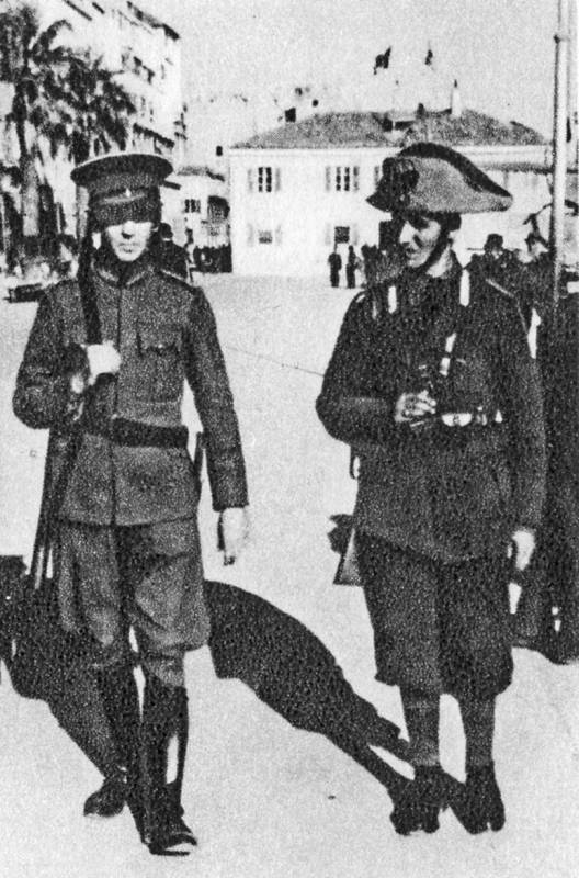 Međuvlašće. Ustaški (bivši jugoslavenski oružnik/žandar) i talijanski karabinjer patroliraju Rivom u travnju 1941.